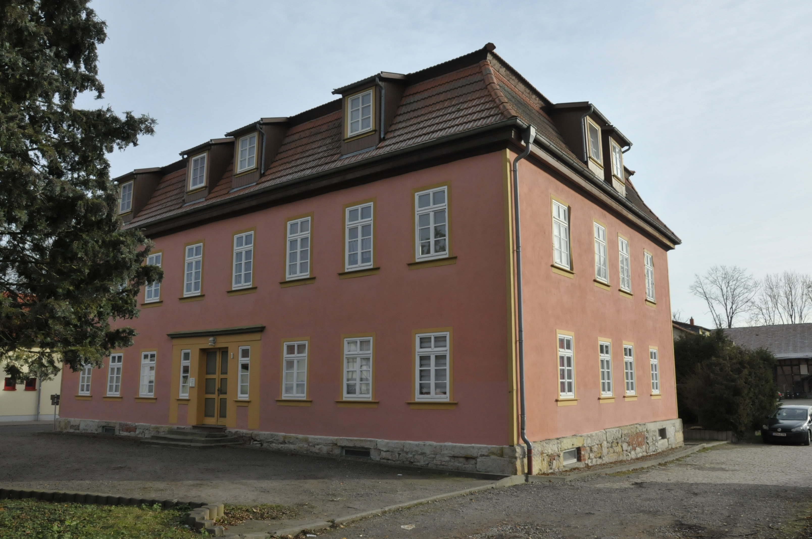 Remstädt, Gutshaus